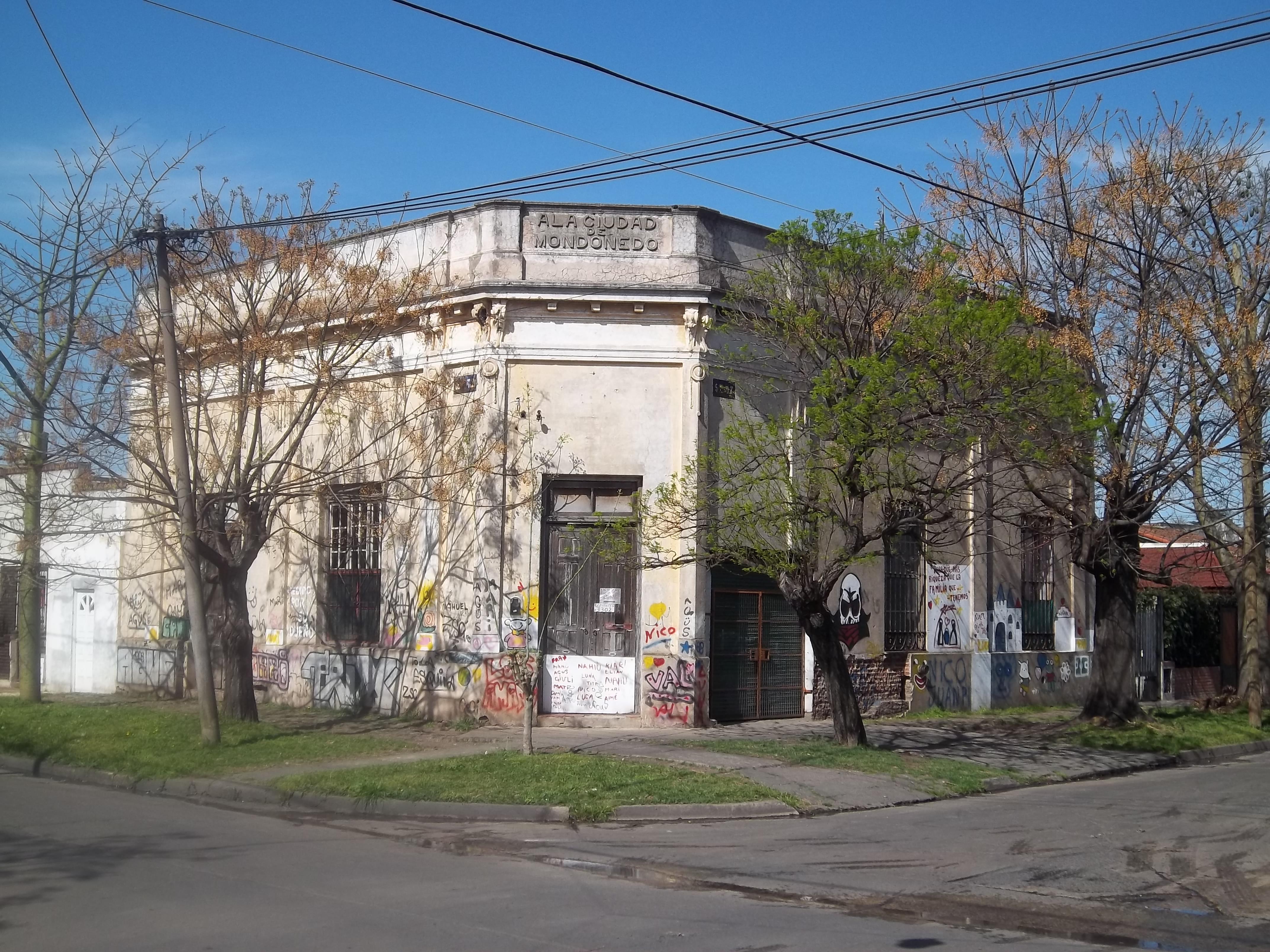 Primera casa en Rafael Calzada, de fines del siglo XIX, en el partido de Almirante Brown, provincia de Buenos Aires, Argentina.